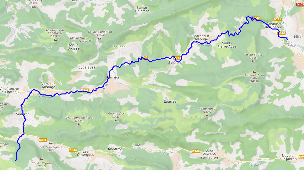 carte réalisée sur umap This map may be incomplete, and may contain errors. Don't rely solely on it for navigation.